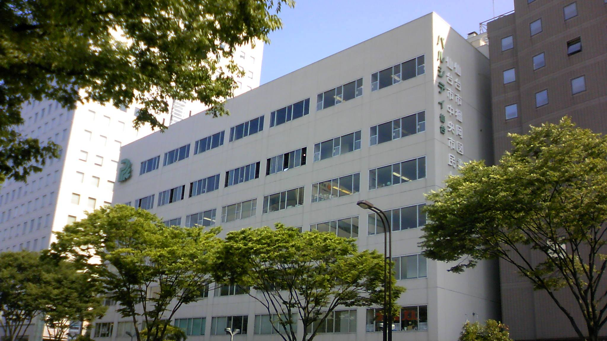 仙台市榴岡図書館